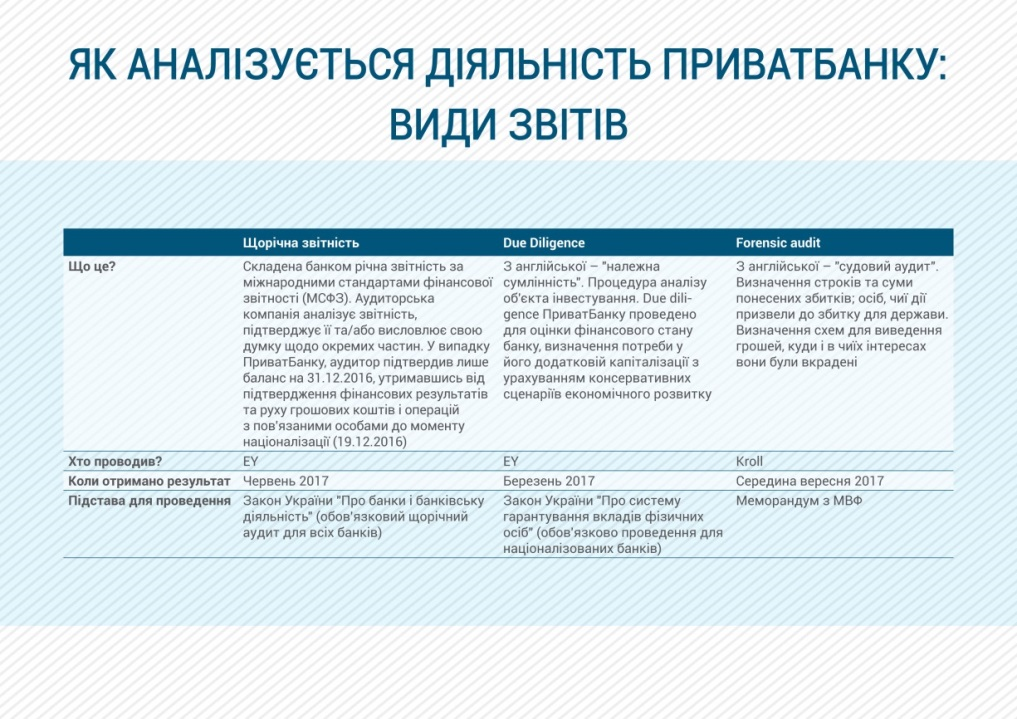 Як аналізується діяльність "ПриватБанку": види звітів